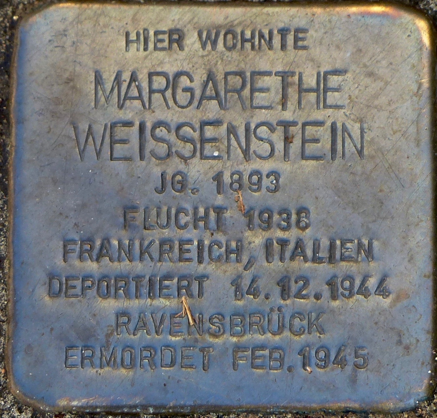 Stolpersteine in Salzburg: Margarethe Weissenstein, Franz-Josef-Str.11